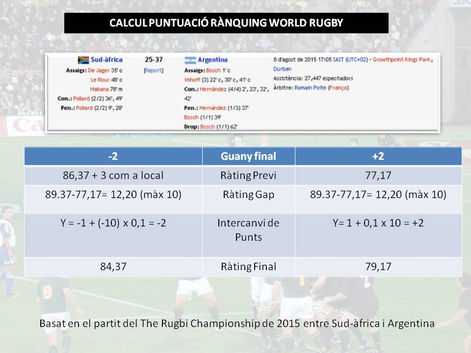 Com es calcula el rànquing IRB